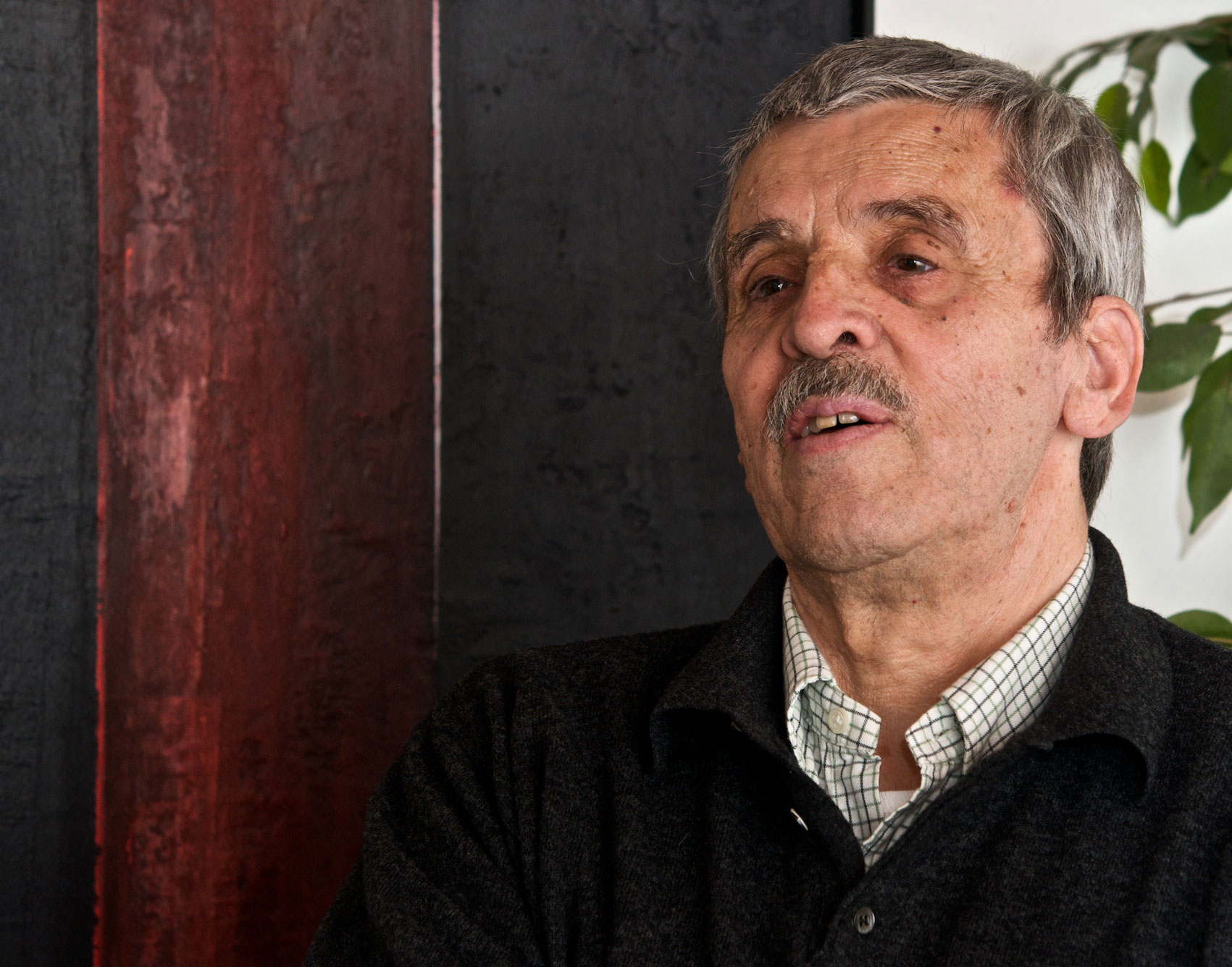 De François Schortgen am Februar 2009, gebuer den 11. Oktober 1935 op Belval, ass e lëtzebuergesche Moler. Source:Eege Foto vum Benotzer:Cornischong